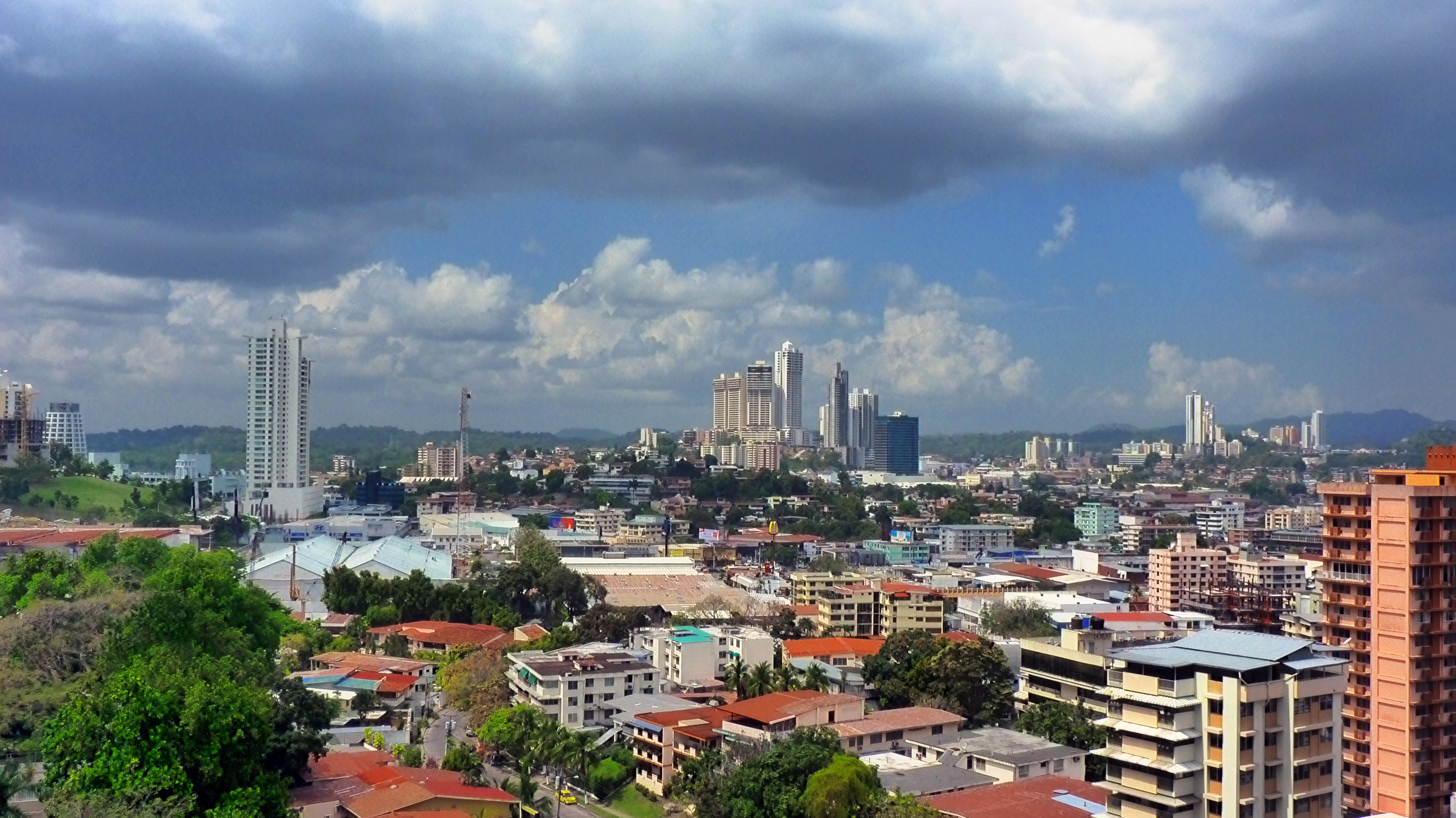 Panamá City, Panamá